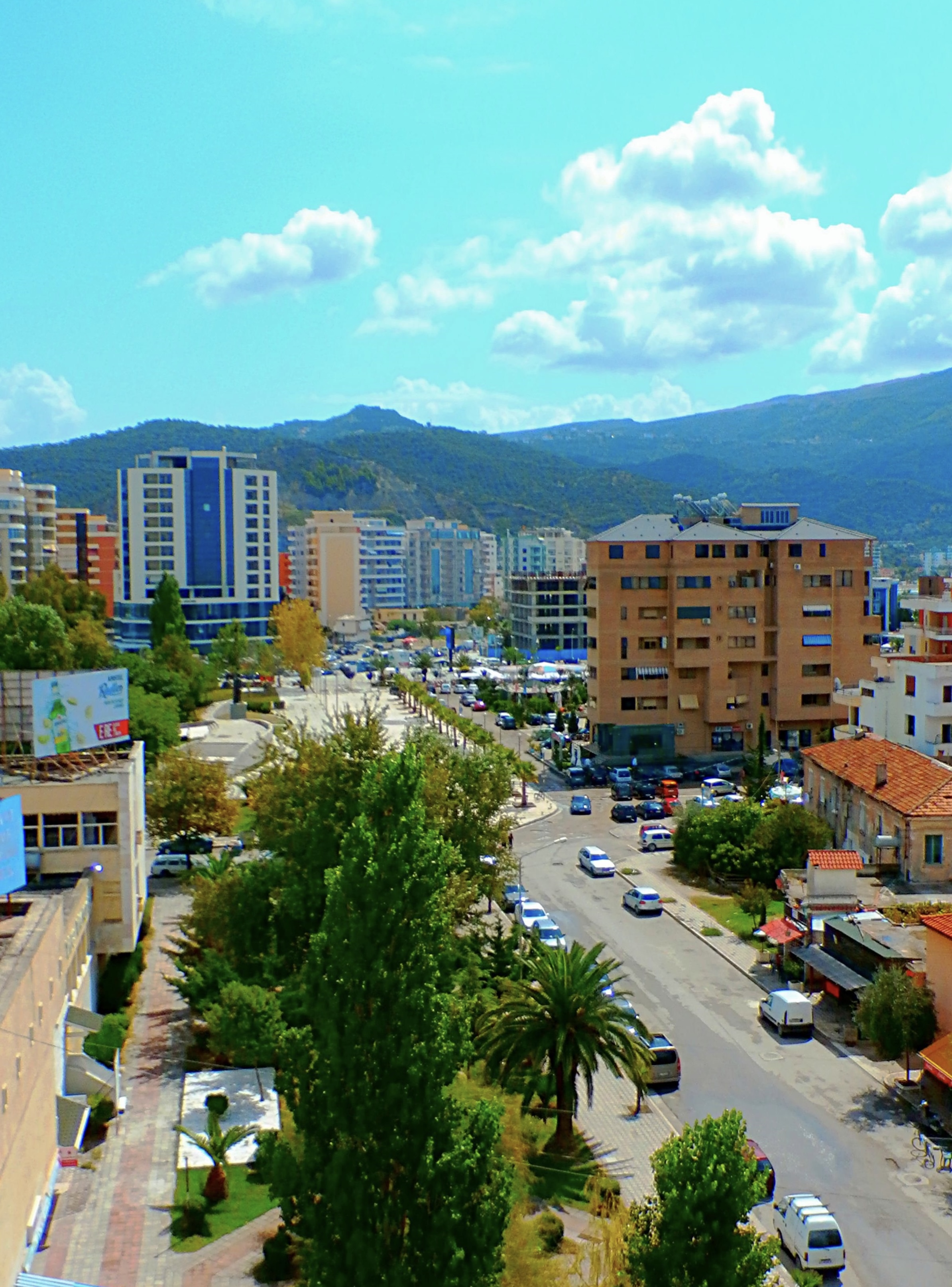 Vlore